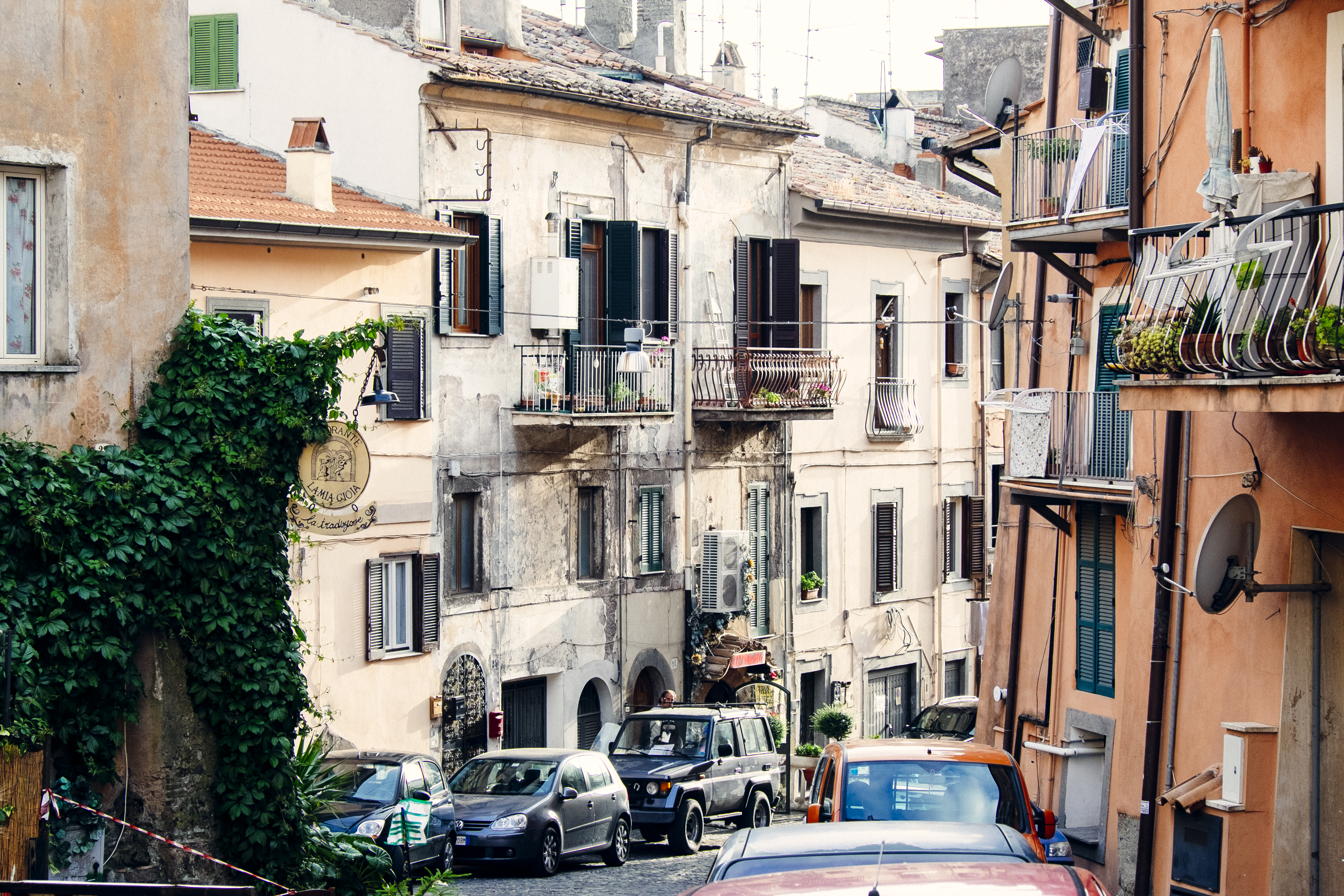 Vido malsupren al dekliva strato kun dense parkitaj aŭtoj kaj multaj balkonetoj.